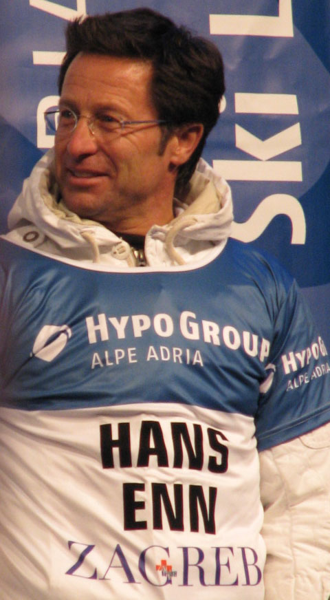 Hans Enn